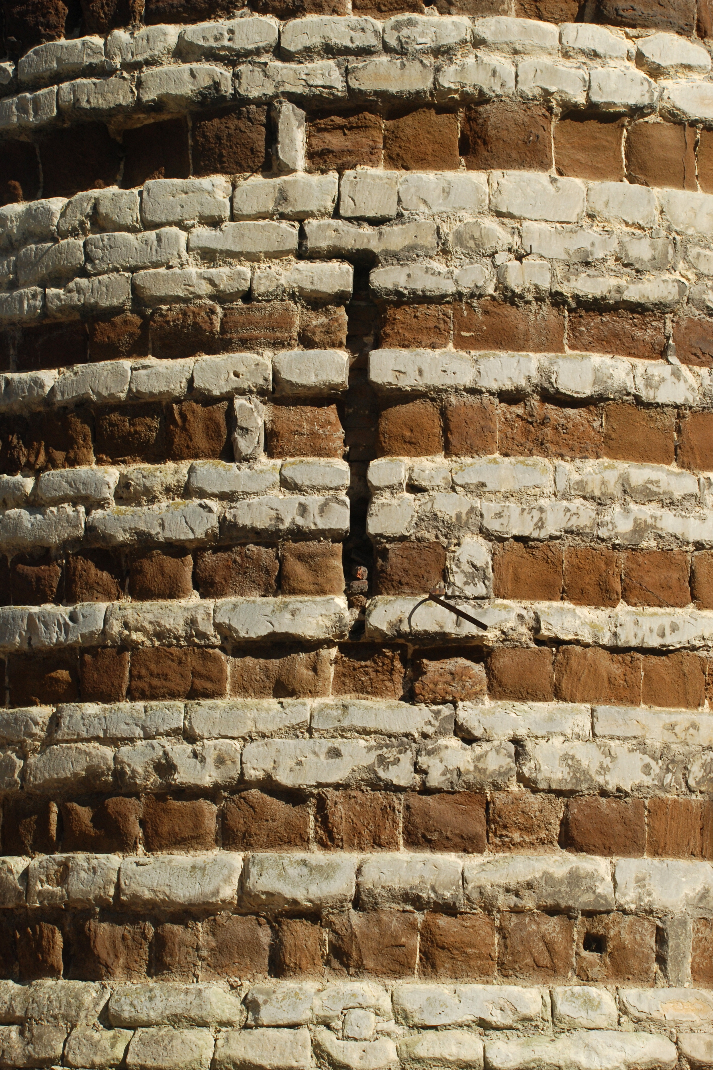 Belgique - Brabant flamand - Louvain - Première enceinte de Louvain - terrain des hôpitaux universitaires Saint-Pierre et Saint-Raphaël